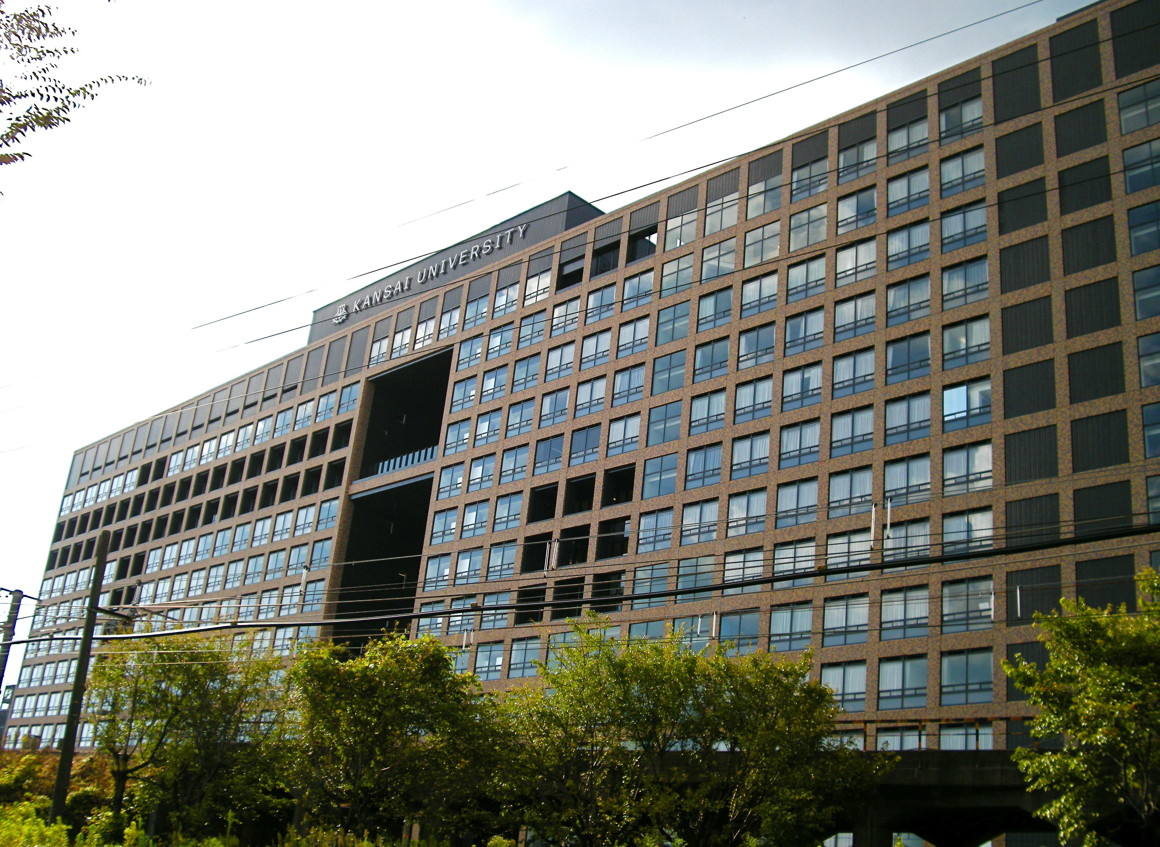 Kansai University Muse Campus (Takatsuki, Osaka, Japan)